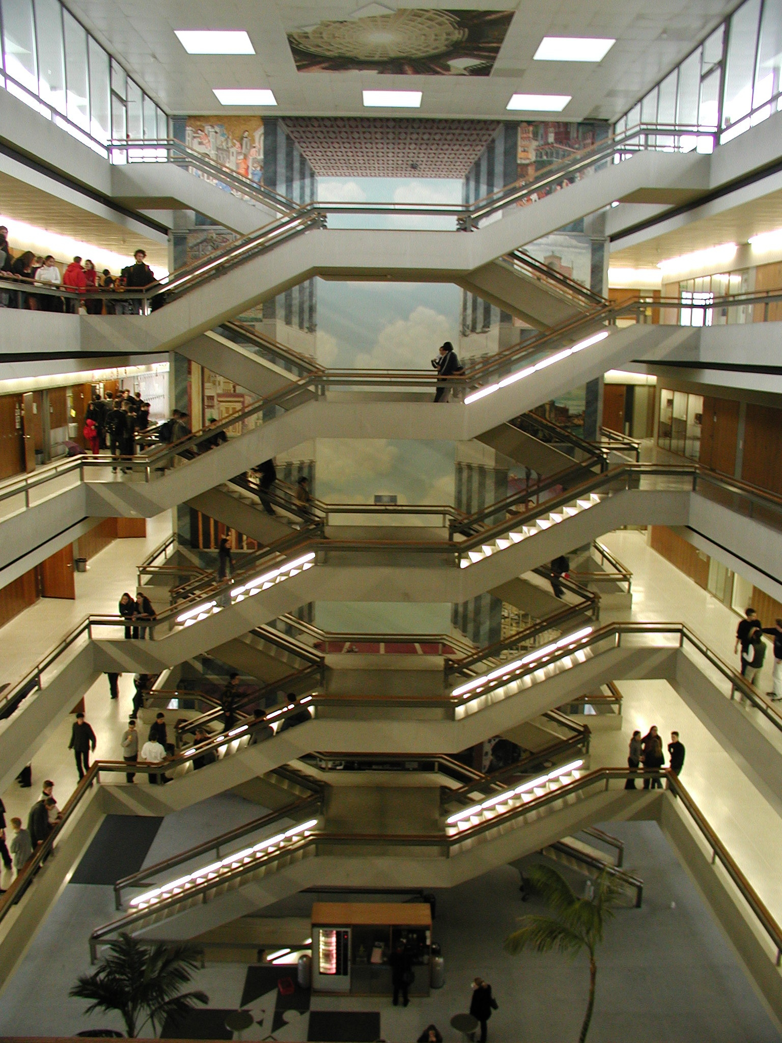 Galerie des Gymnasiums Neufeld in Bern